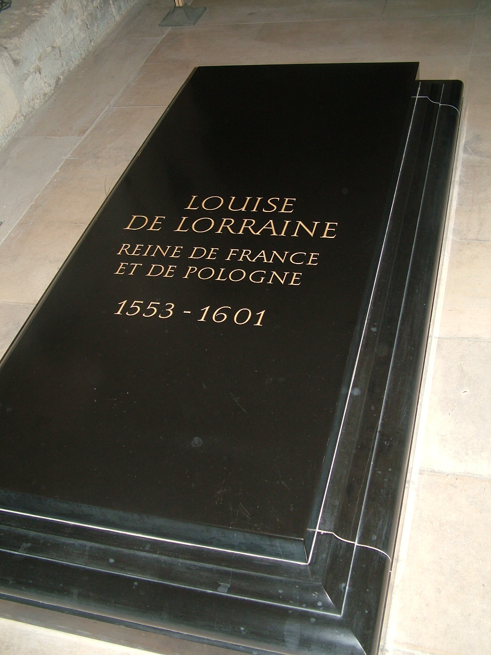 Grab der Königin Louise de Lorraine in Saint-Denis.